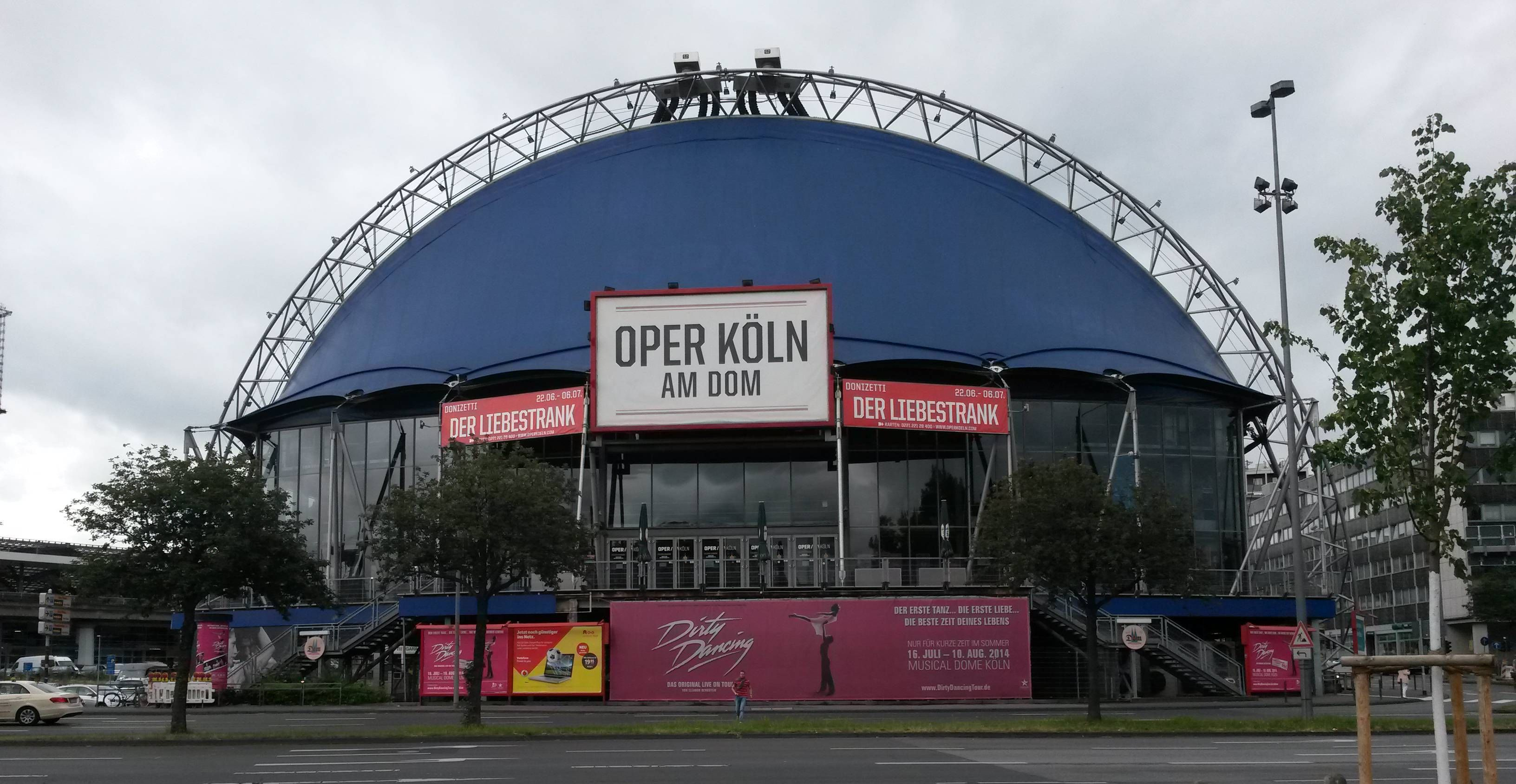 Musical Dom Köln